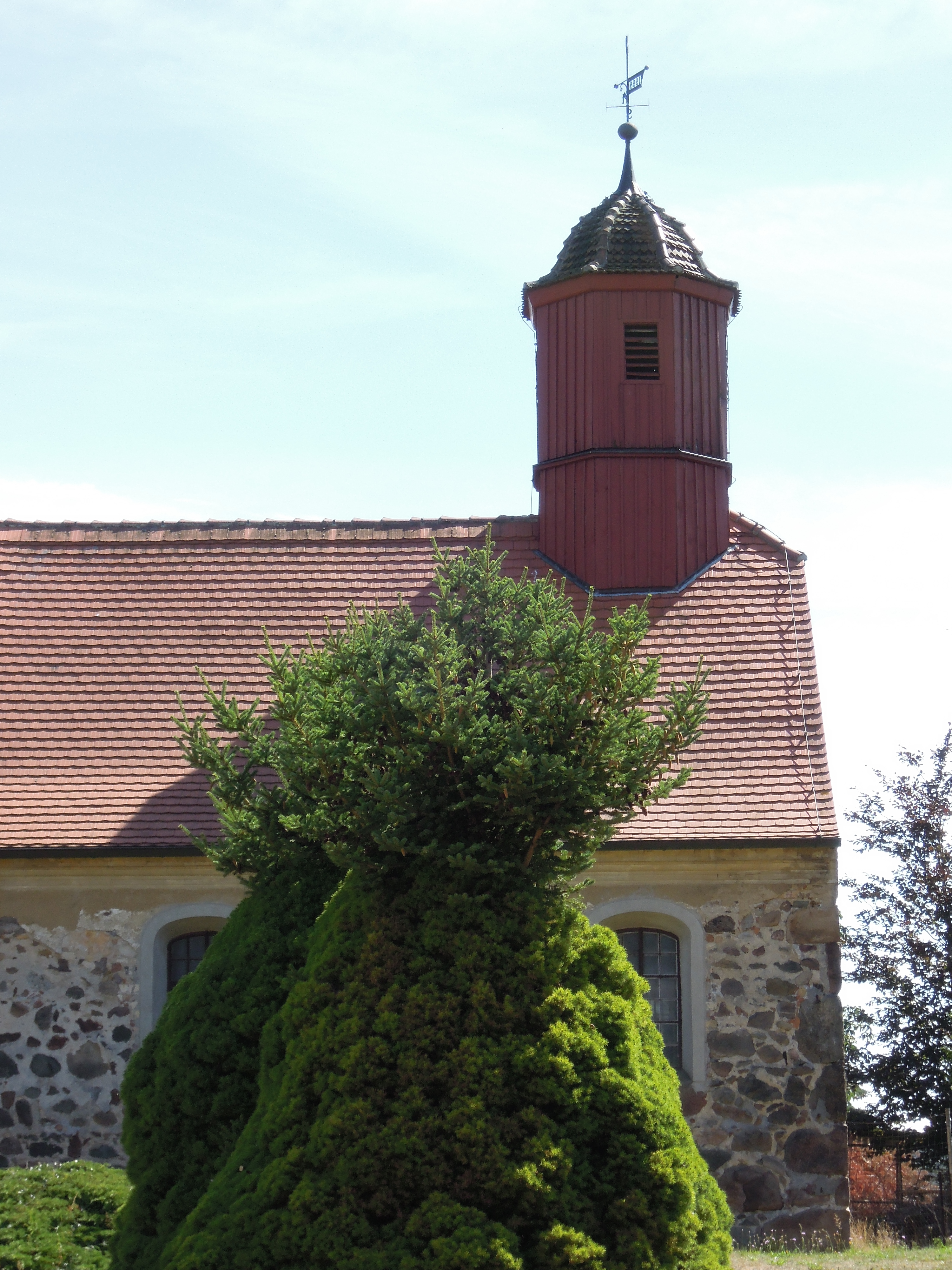 Kirche Ogkeln -Nordansicht mit verdeckter Pforte, Hochkant- im August 2020